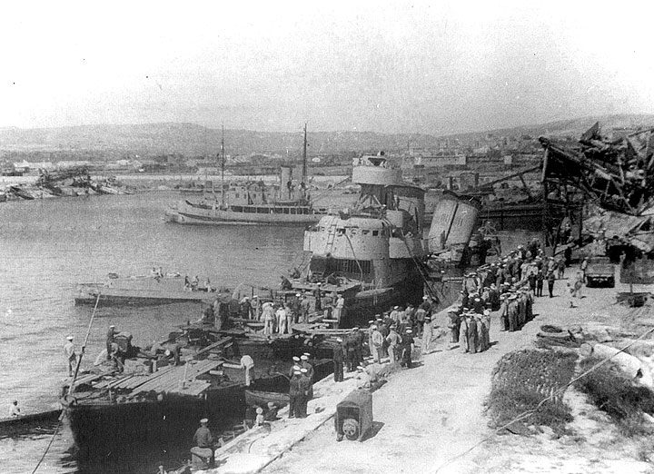 Soviet destroyer leader «Tashkent», salvaged in 1944 after being sunk in Novorossiysk